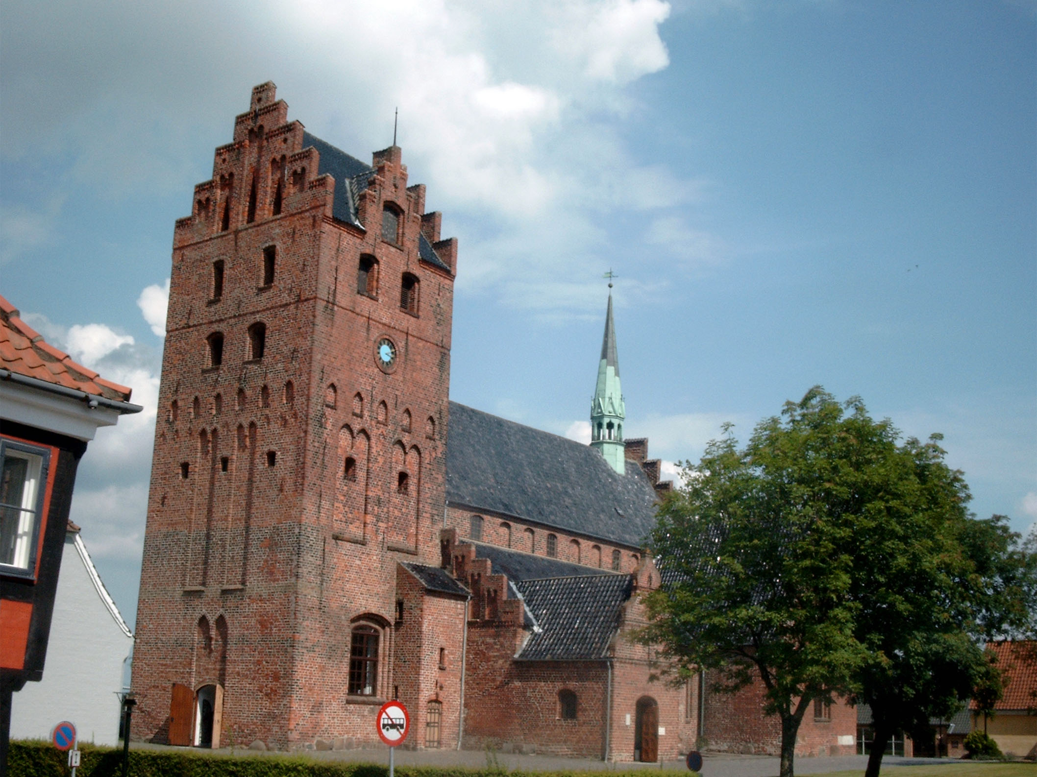 Sankt Nikolai kirke, Middelfart sogn, Middelfart Kommune (former: Odense Herred, Odense Amt).